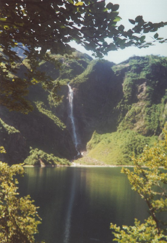 Cascade du lac d'Oo, Haute-Garonne, dans les gorges d'Astau Date : Juillet 1992